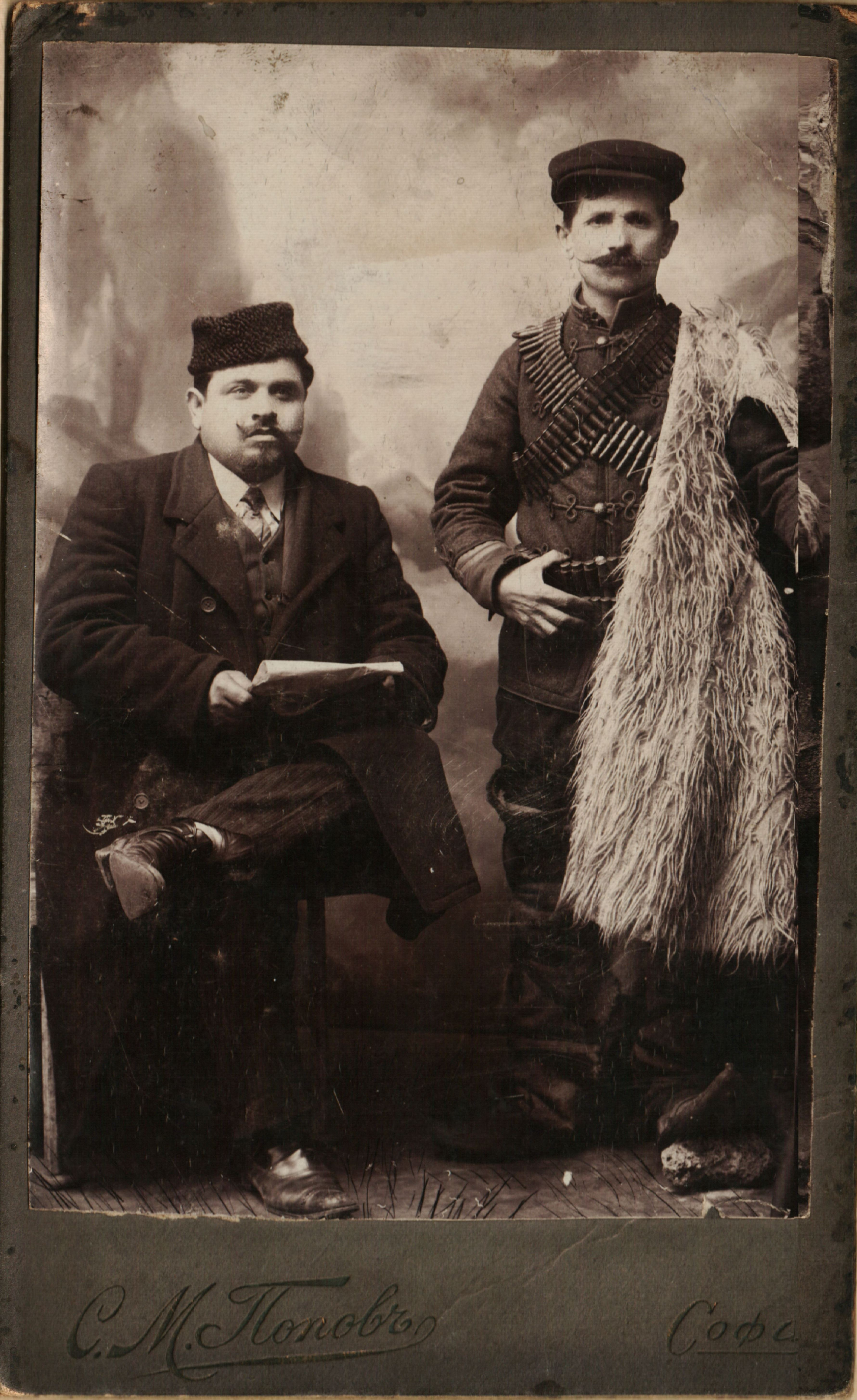 Алексо Джорлев и Кочо Цонката.